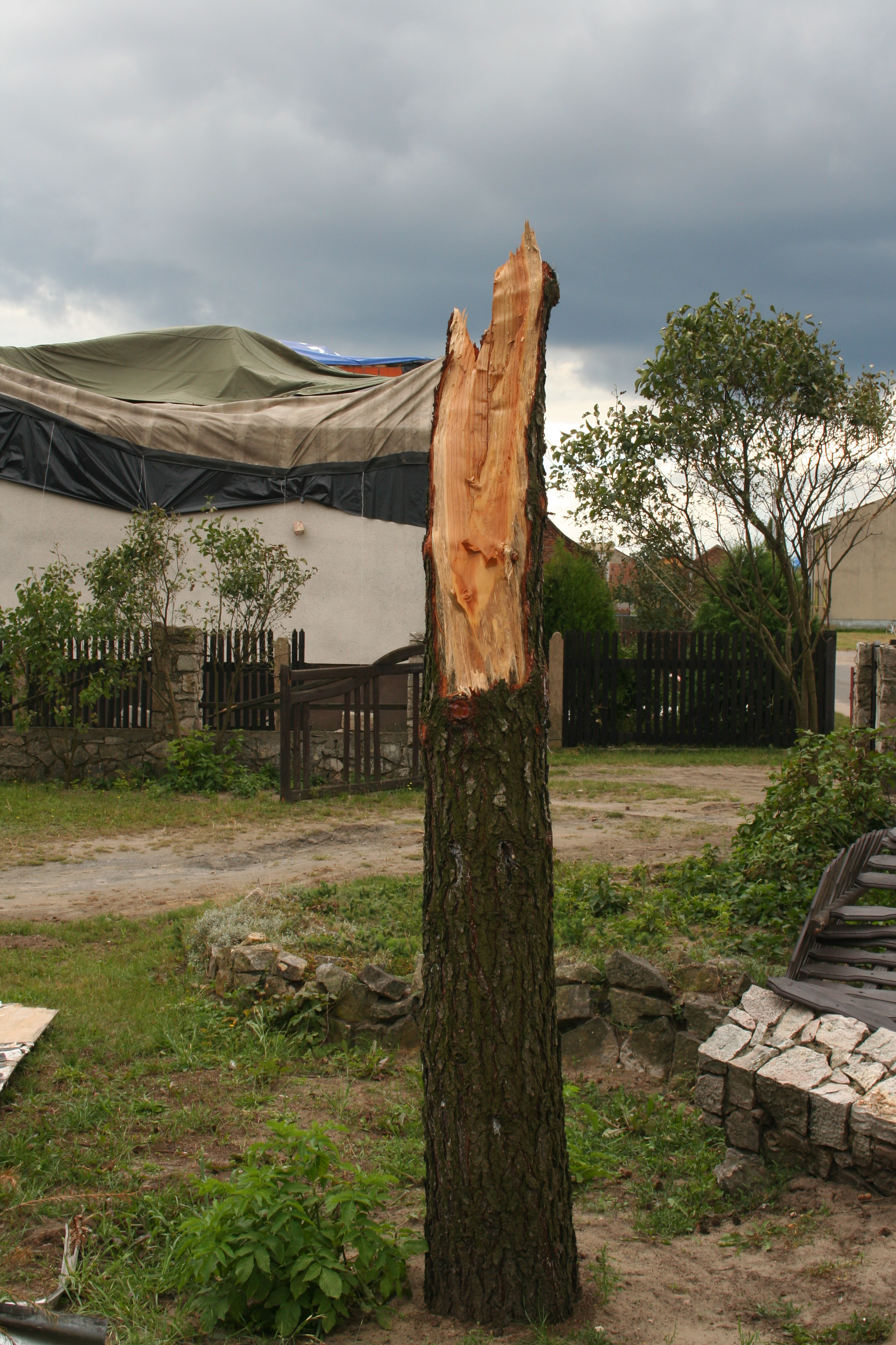 Kalina tydzień po przejściu nad nią tornada, powiat lubliniecki. Pozostałość z pnia modrzewia europejskiego, który zwalił się budynek